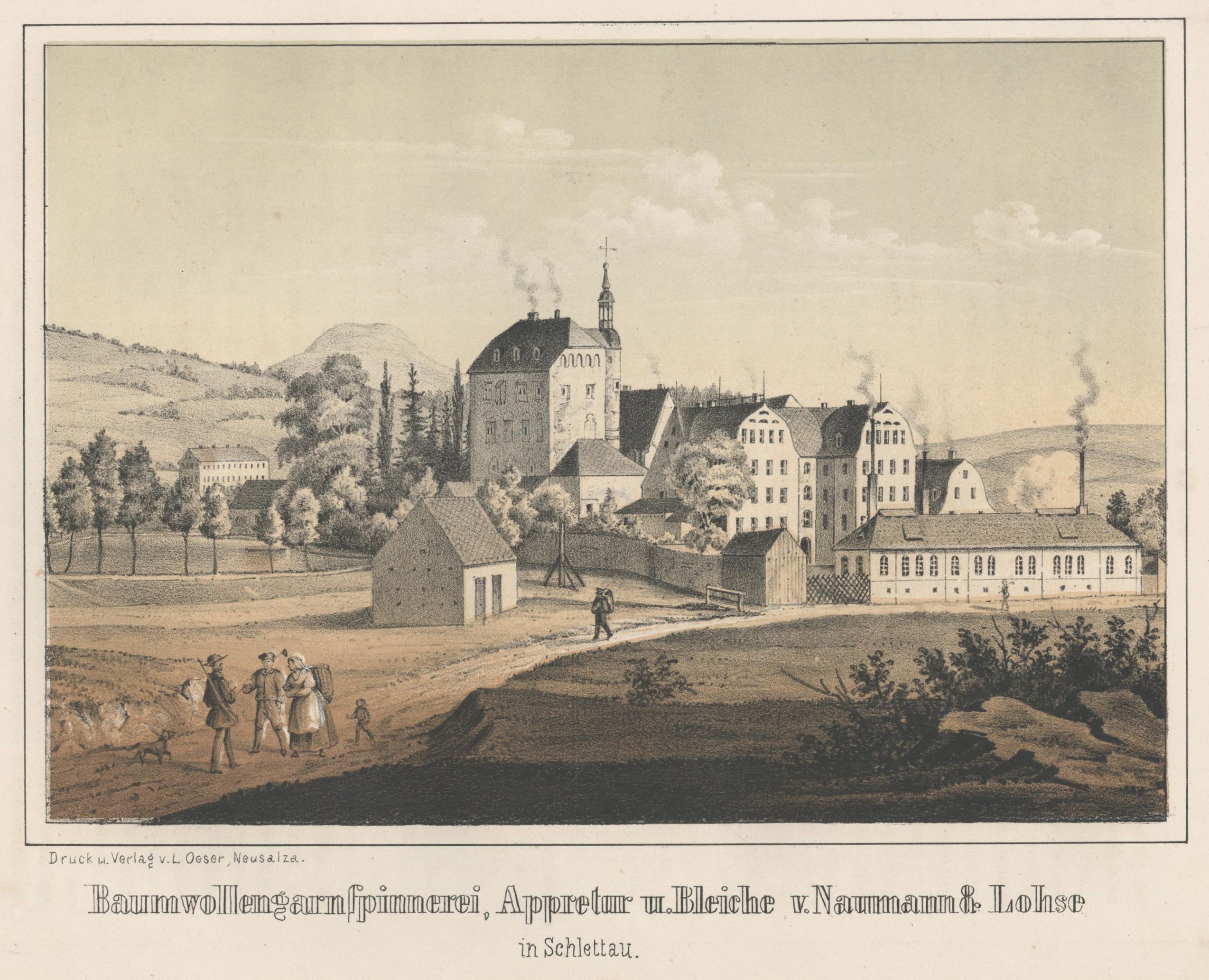 Baumwollengarnspinnerei, Appretur und Bleiche von Naumann & Lohse in Schlettau aus: Album der Sächsischen Industrie Erster Band